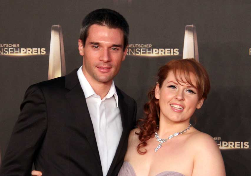 Maite Kelly mit Ehemann beim Deutschen Fernsehpreis 2012